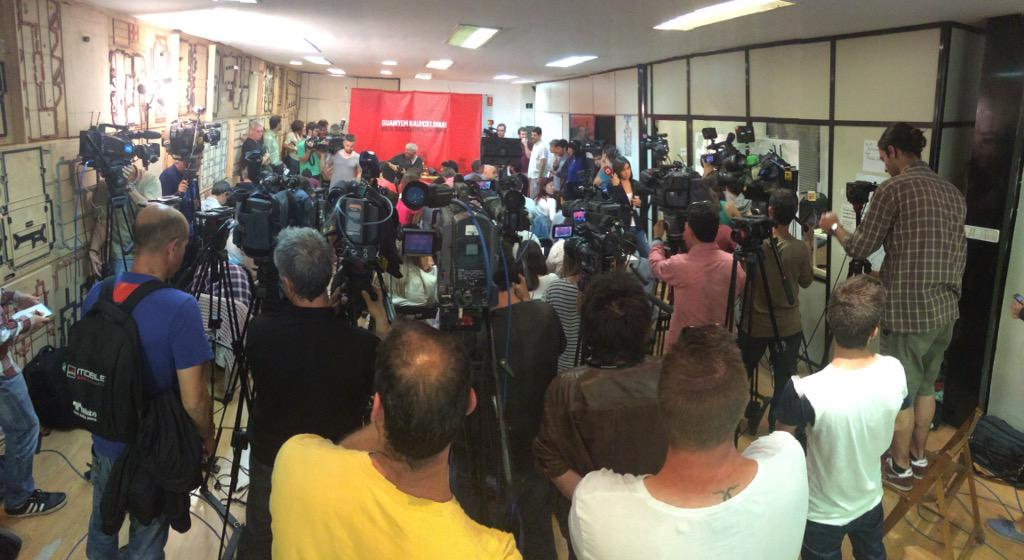 Roda de premsa de Barcelona en comú